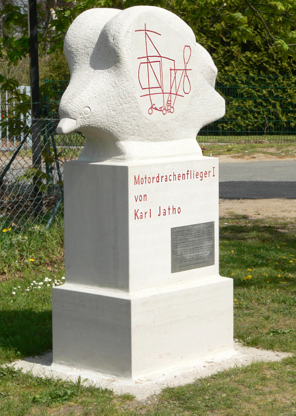 Gedenkstein für Karl Jatho nahe seinem früheren Flugfeld, Hannover, am Straßenrand